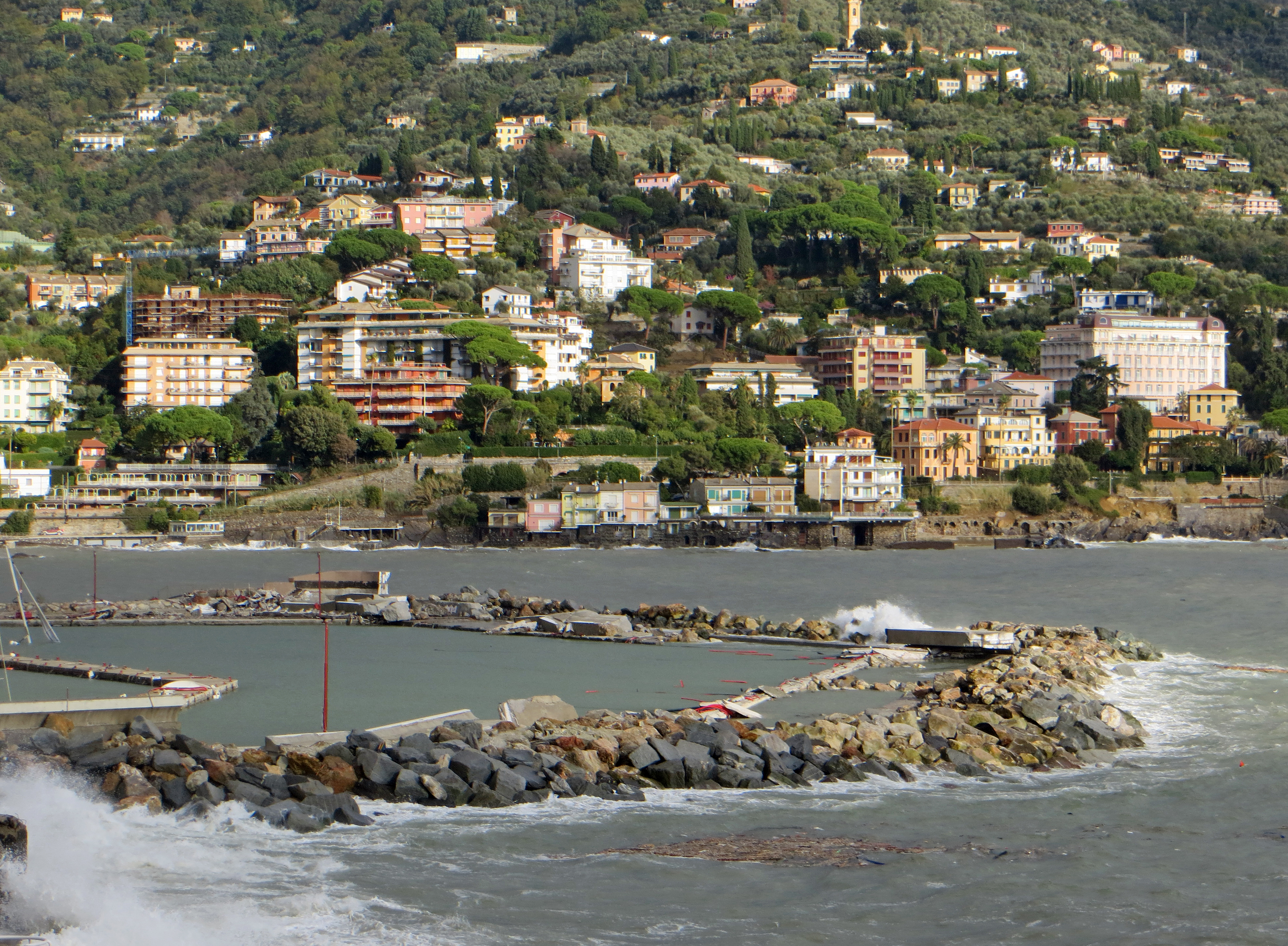 Particolare dei danni provocati dalla mareggiata del 29 e 30 ottobre 2018 alla diga foranea del porto Carlo Riva di Rapallo, Liguria, Italia